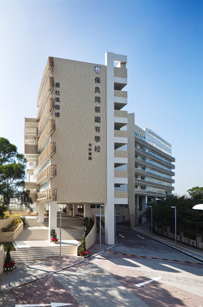 中文（香港）: 保良局蔡繼有學校